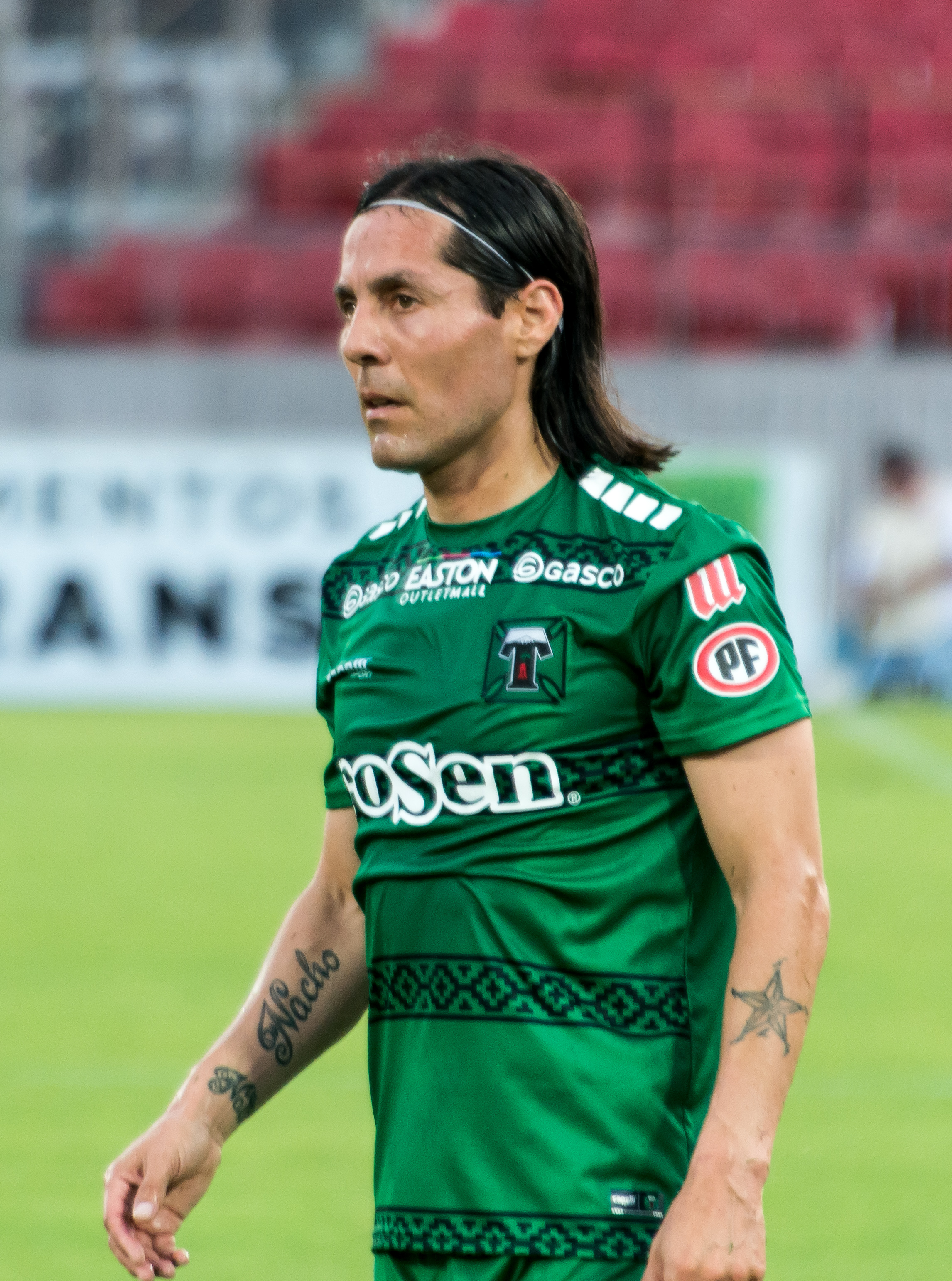 Deportes La Serena v Deportes Temuco, Estadio Nacional de Chile, Ñuñoa, Santiago, Región Metropolitana, Chile